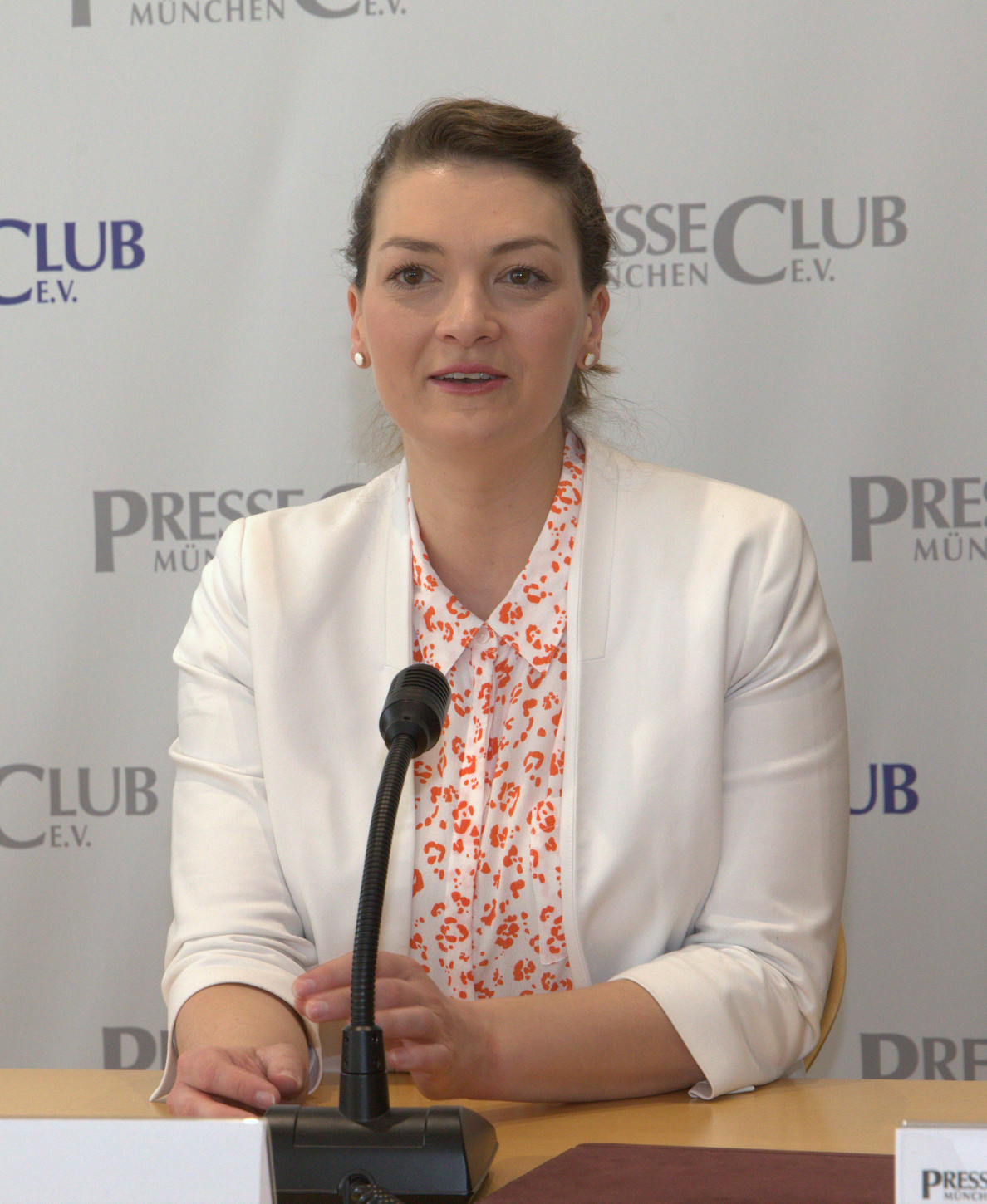 Judith Gerlach, Politikerin (CSU), seit 12. November 2018 Bayerische Staatsministerin für Digitales. Hier am 11. März 2020 im Münchner PresseClub Titel des Werks: "Judith Gerlach (2020)"